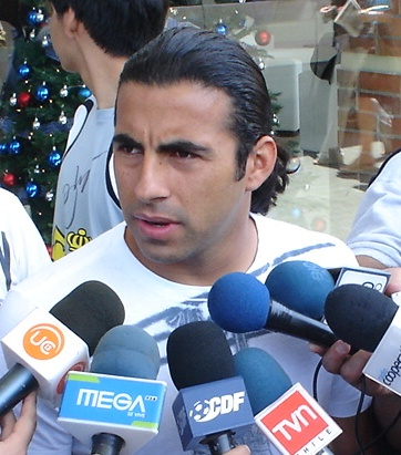 Claudio Maldonado